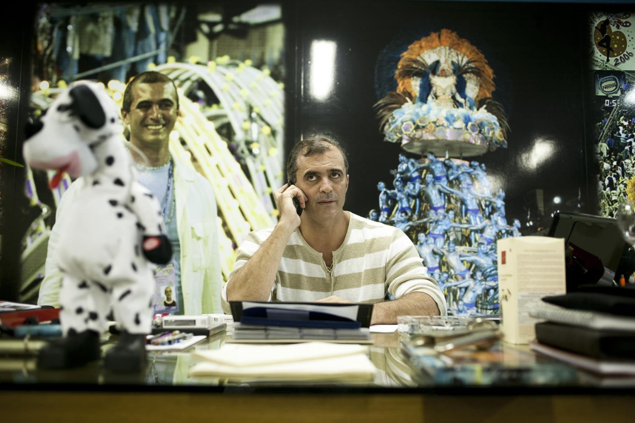 Ensaio Paulo Barros, Produção Cultural no Brasil